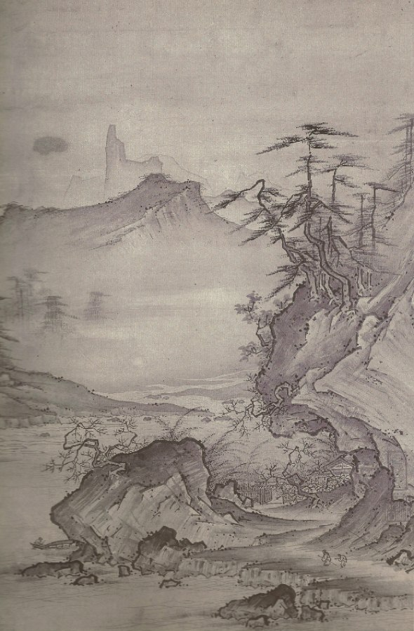 Paysage, peinture par le peintre japonais Shōkei Kenkō des XVe-XVIe siècles. C'est une encre et couleurs légères sur papier de 51x33,5 centimètres. Elle est conservée au Musée Nézu de Tōkyō.